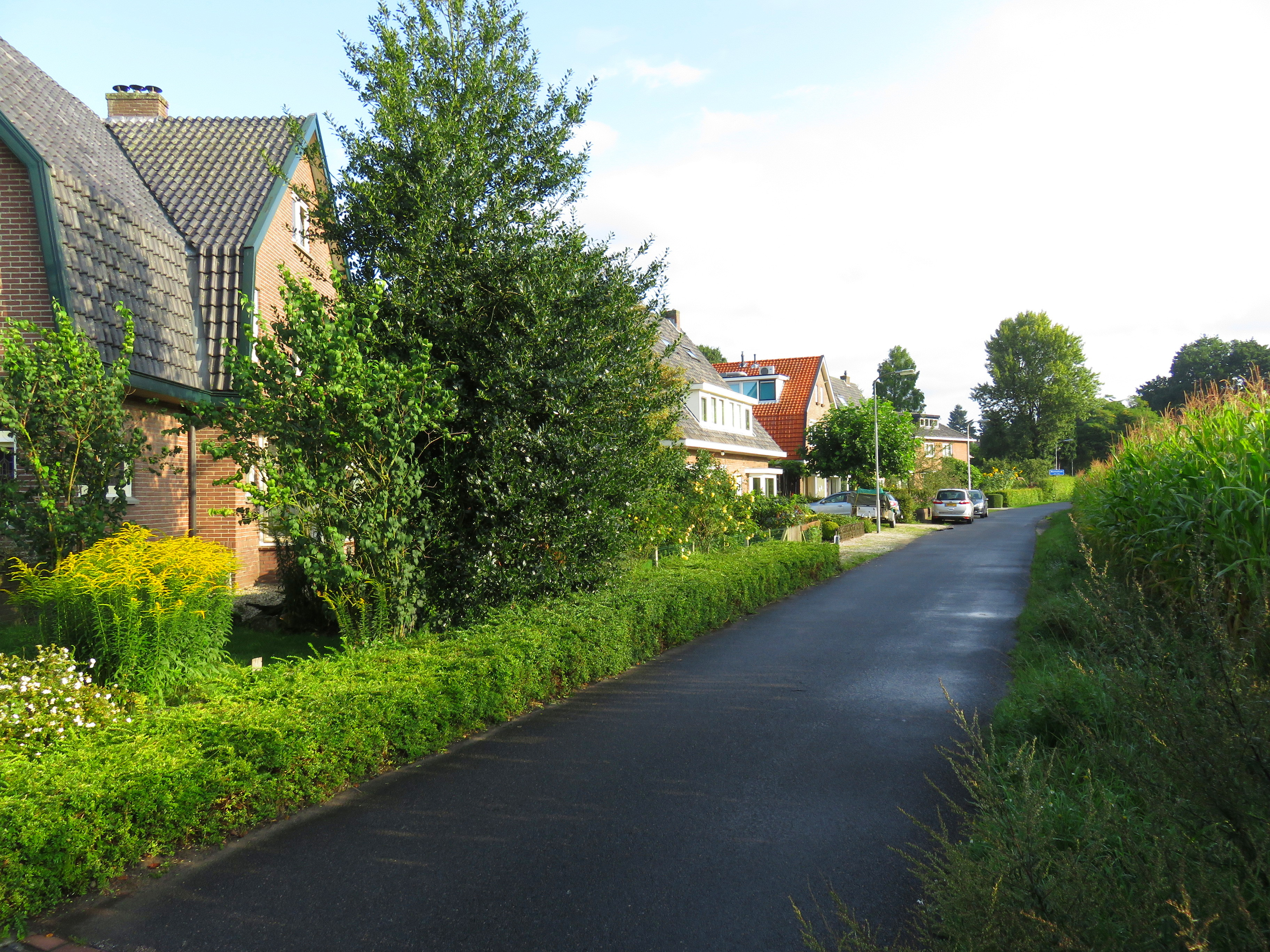 Diedenweg aan de rand van Bennekom